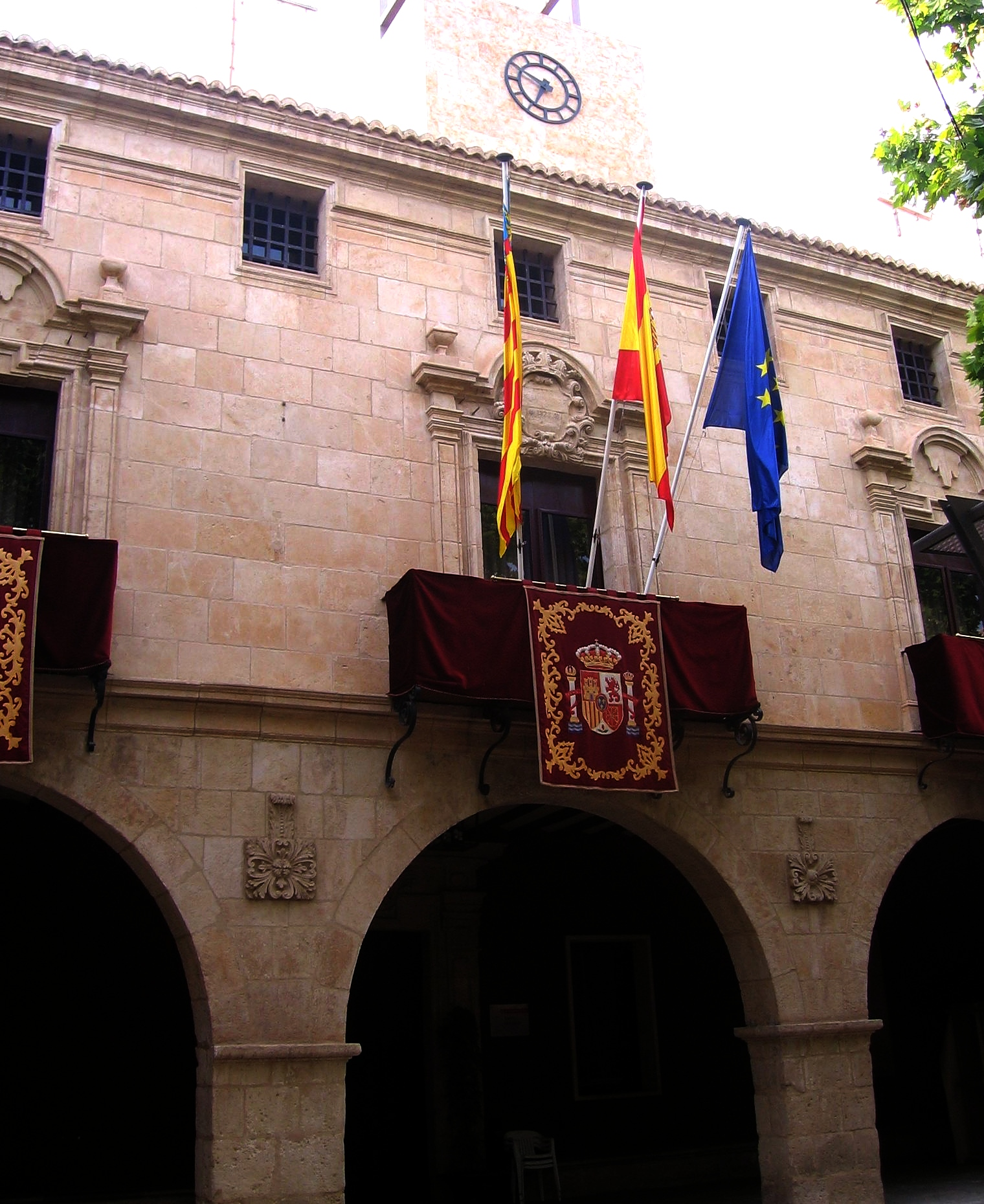 Edificio histórico del Ayuntamiento de Aspe